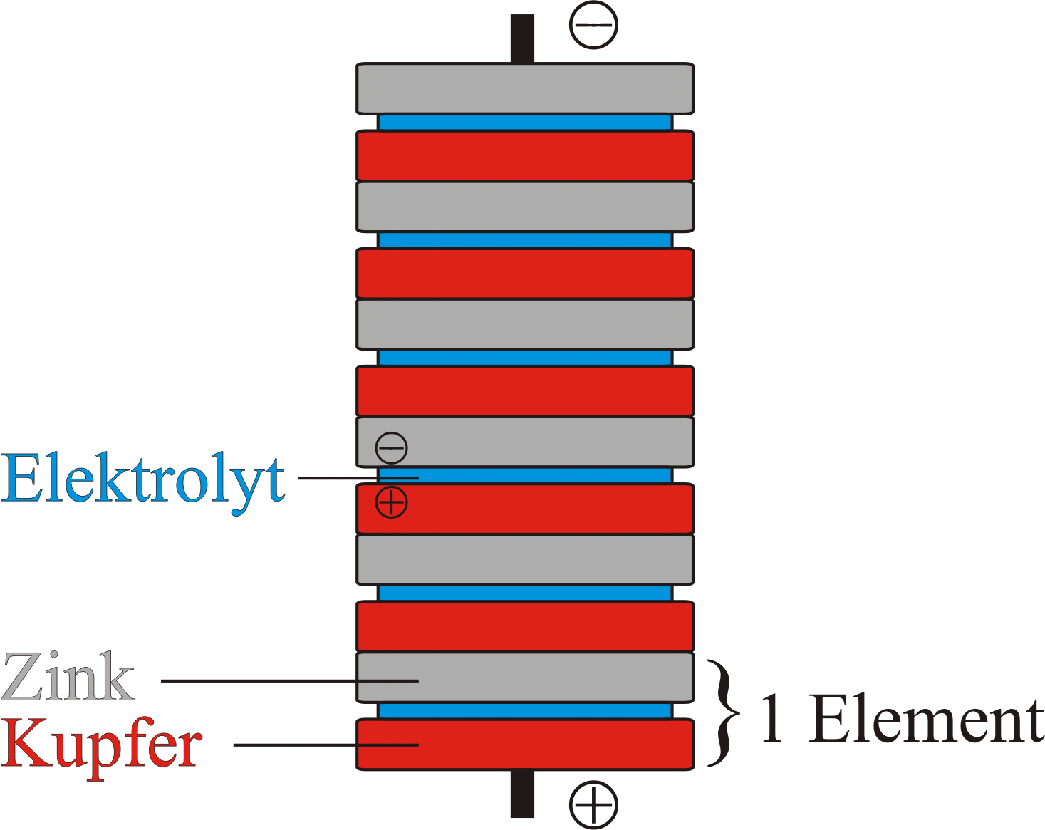 Schema einer Voltaschen Säule aus Kupfer und Zinkscheibchen mit dem Elektrolyten dazwischen.